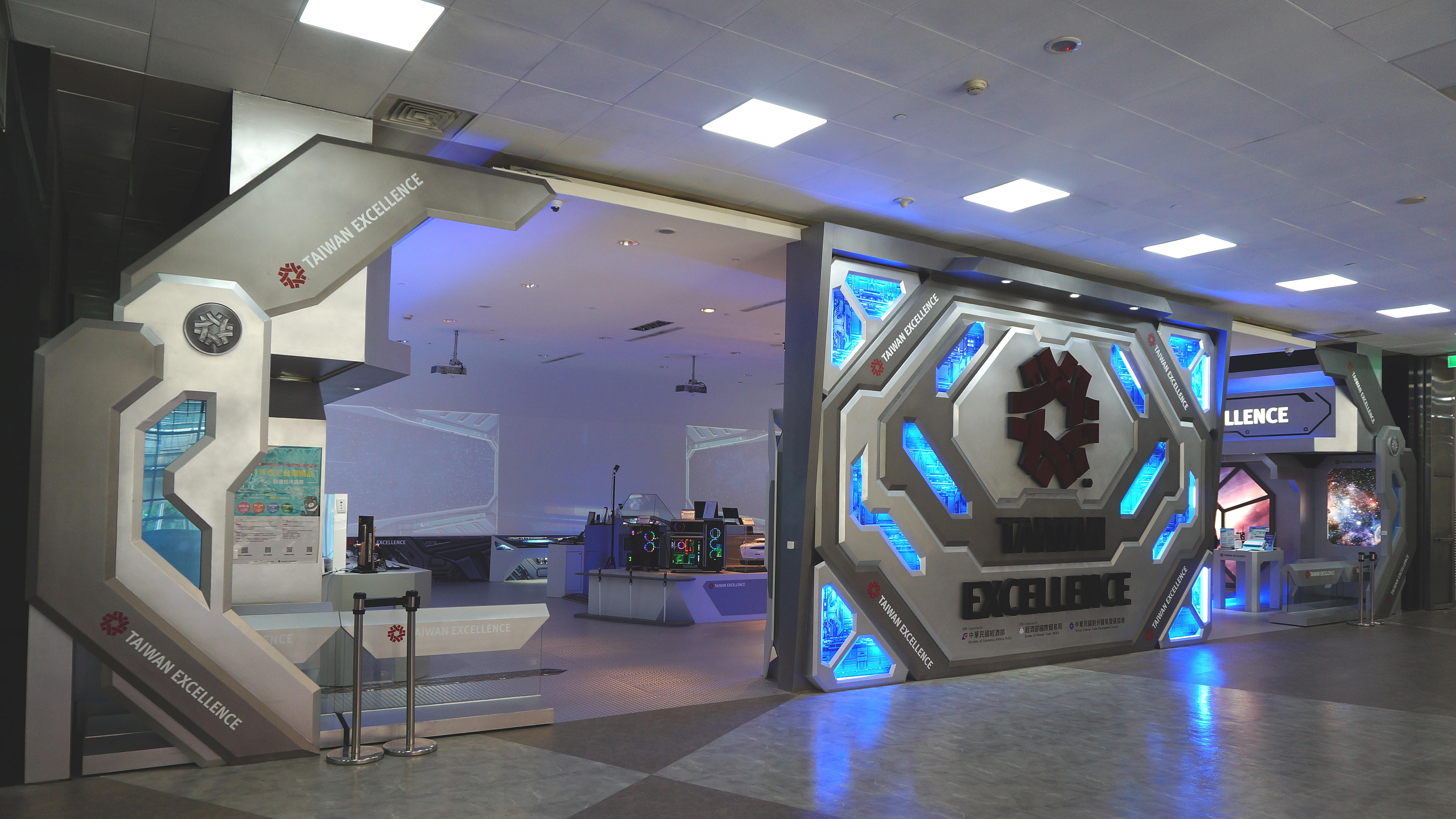 台北南港展覽館1館3樓台灣精品館。